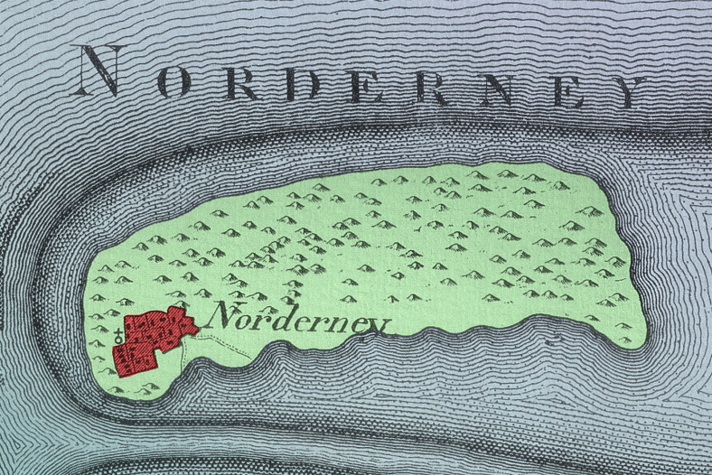 Zeichnung von Norderney, 1805 angefertigt